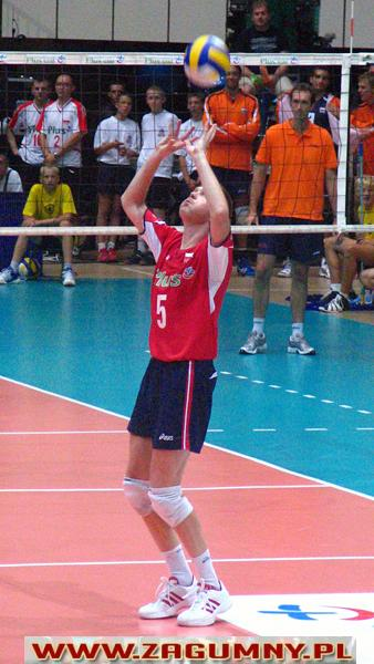 Paweł Zagumny, V Memoriał im. Huberta Wagnera